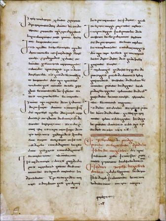 პარხლის მრავალთავი